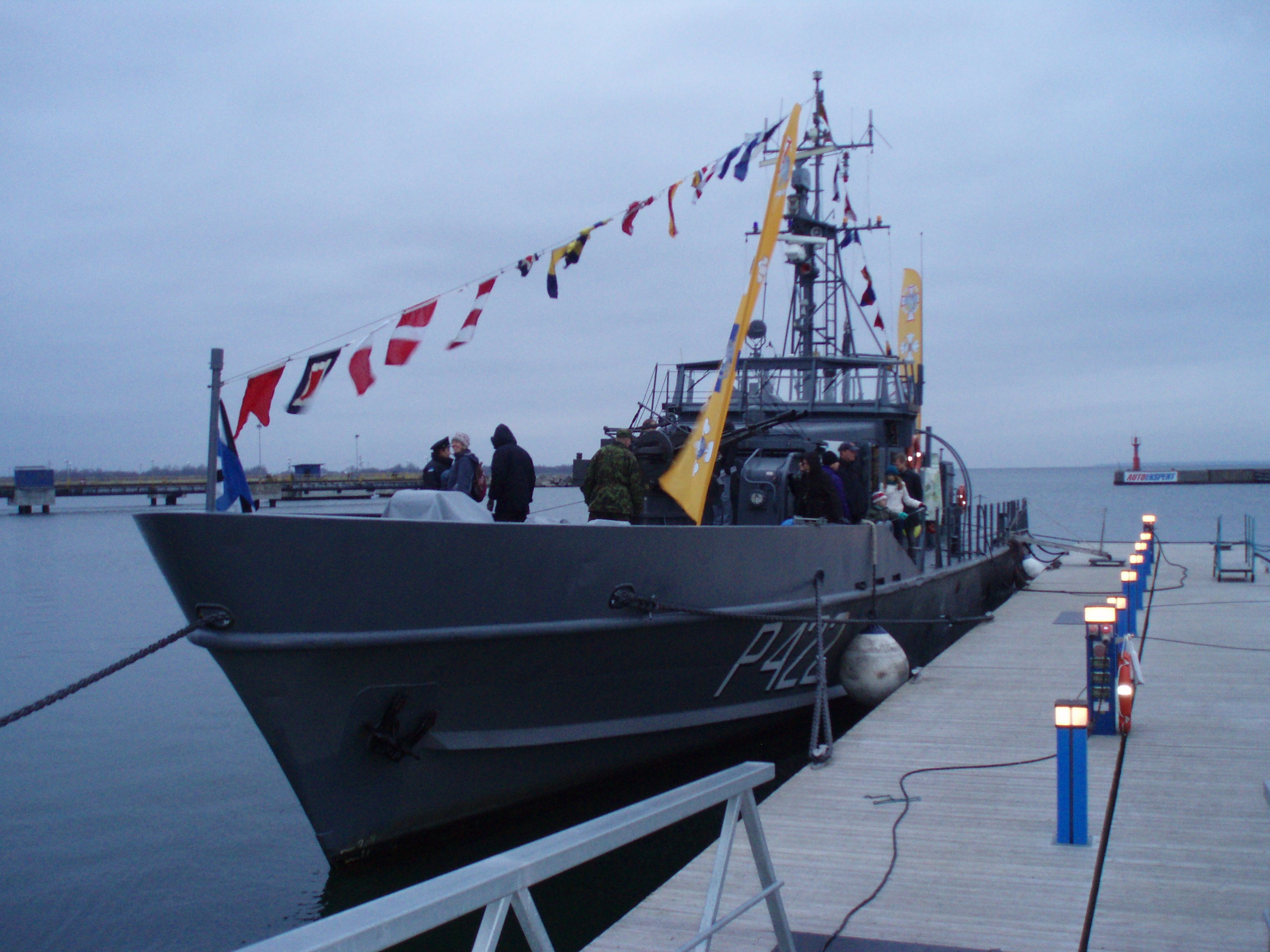 Patrull-laev Ristna P422 Kaitseliidu Tallinna maleva Meredivisjoni egiidi all kõikide laste isadepäeval Tallinnas Lennusadamas 2012.